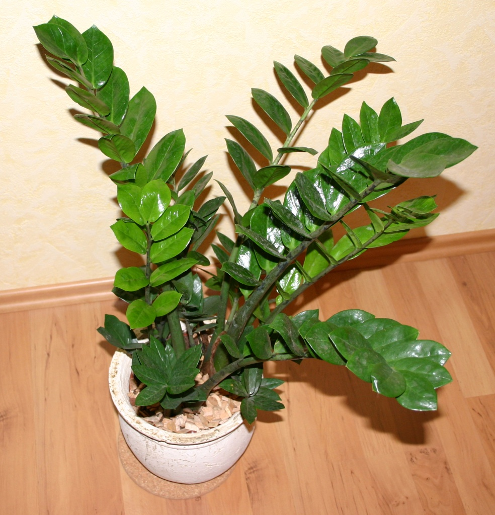 Beschreibung: Zamioculcas (Gesamtansicht) Quelle: fotografiert am 9.10.2004 Fotograf oder Zeichner: Andreas Hammerschmidt Lizenzstatus: Bild-GFDL